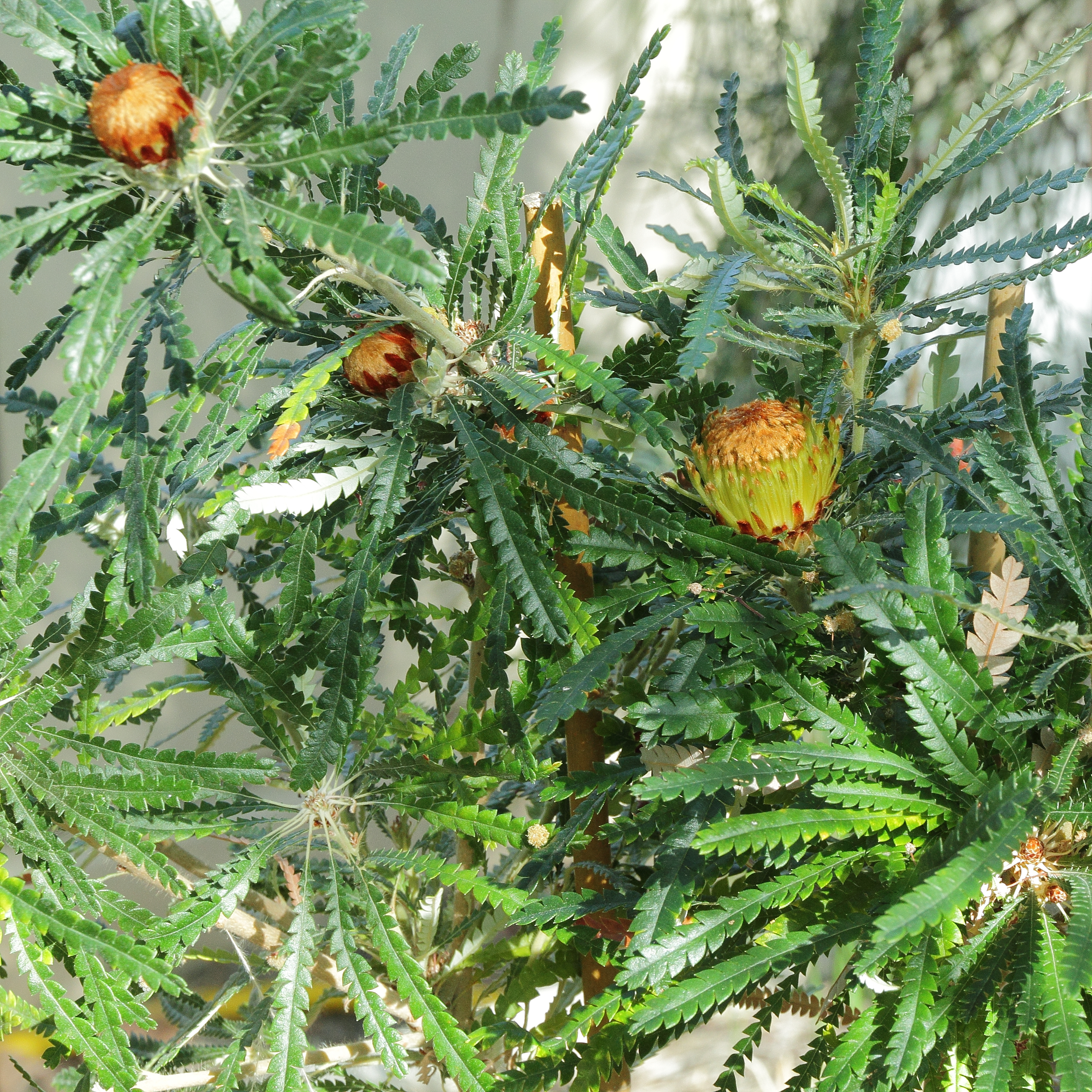 Dryandra formosa i Bergianska trädgården.